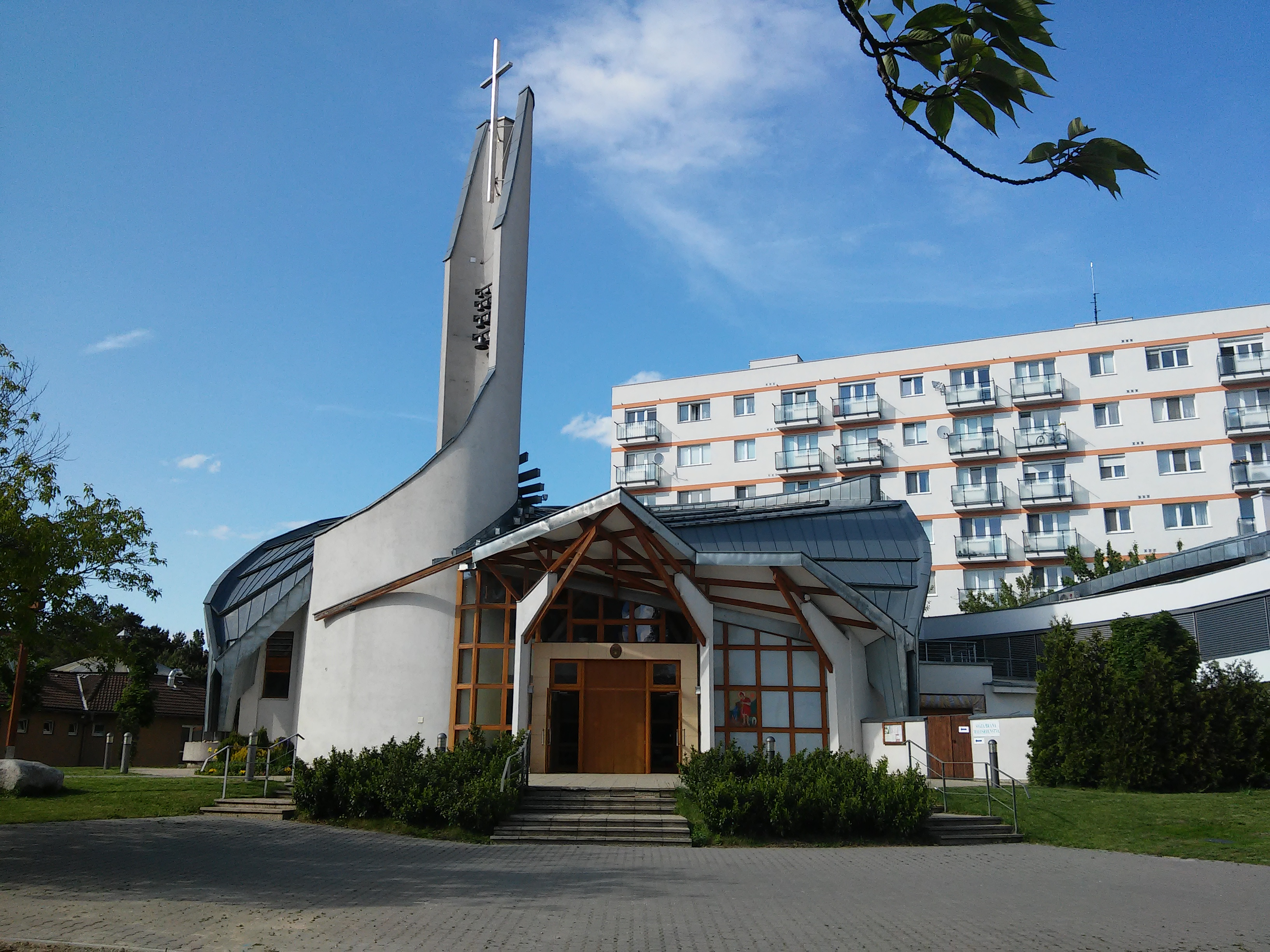 Katedrála svätého Šebastiána, Bratislava - Rača